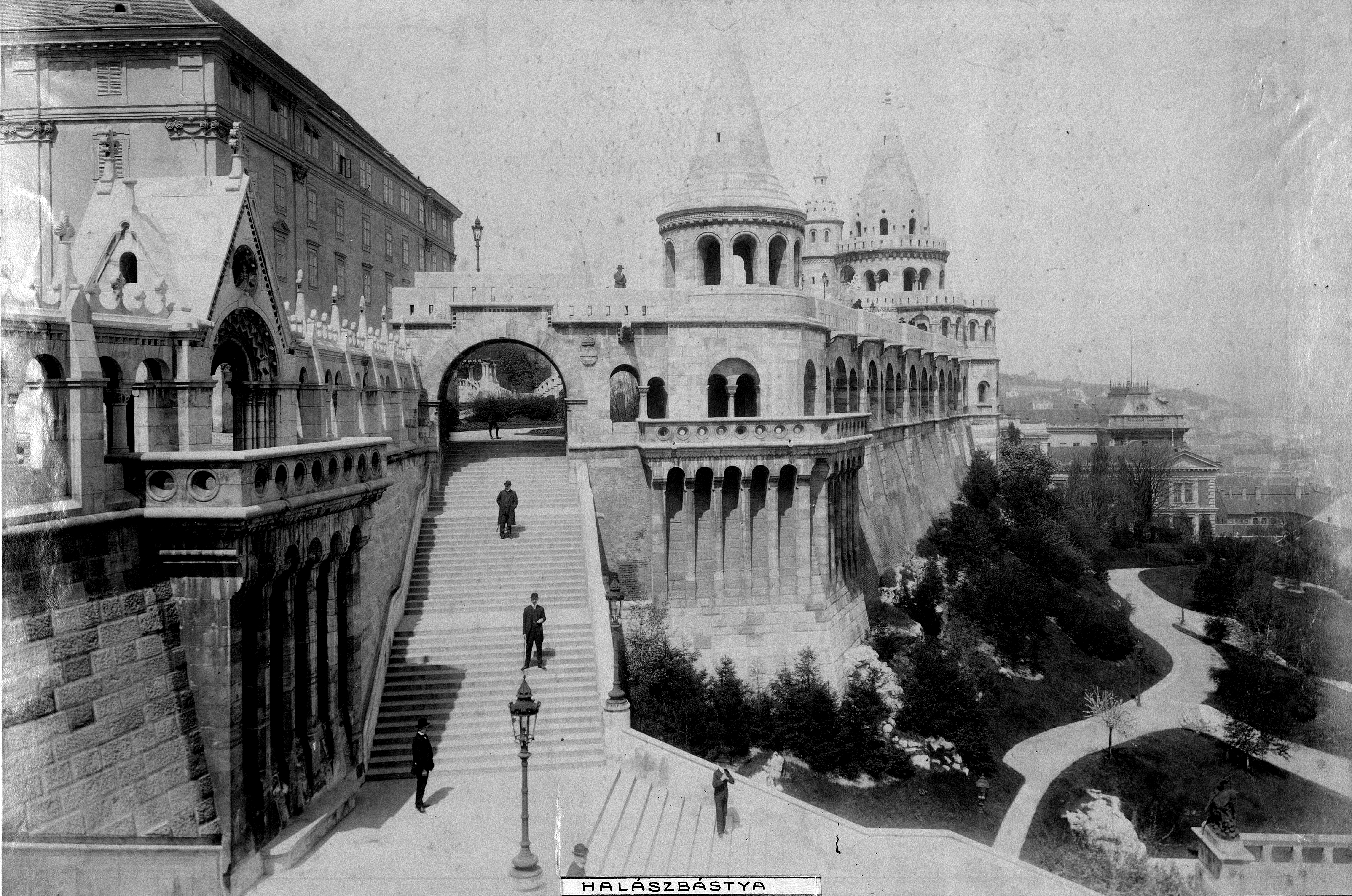 BUDAPEST I. BUDAI VÁR, HALÁSZBÁSTYA Schulek lépcső, balra fent az egykori Jezsuita Akadémia, ma a Hilton szálló van a helyén. A felvétel 1906 után készült. A kép forrását kérjük így adja meg: Fortepan / Budapest Főváros Levéltára. Levéltári jelzet: HU.BFL.XV.19.d.1.08.124